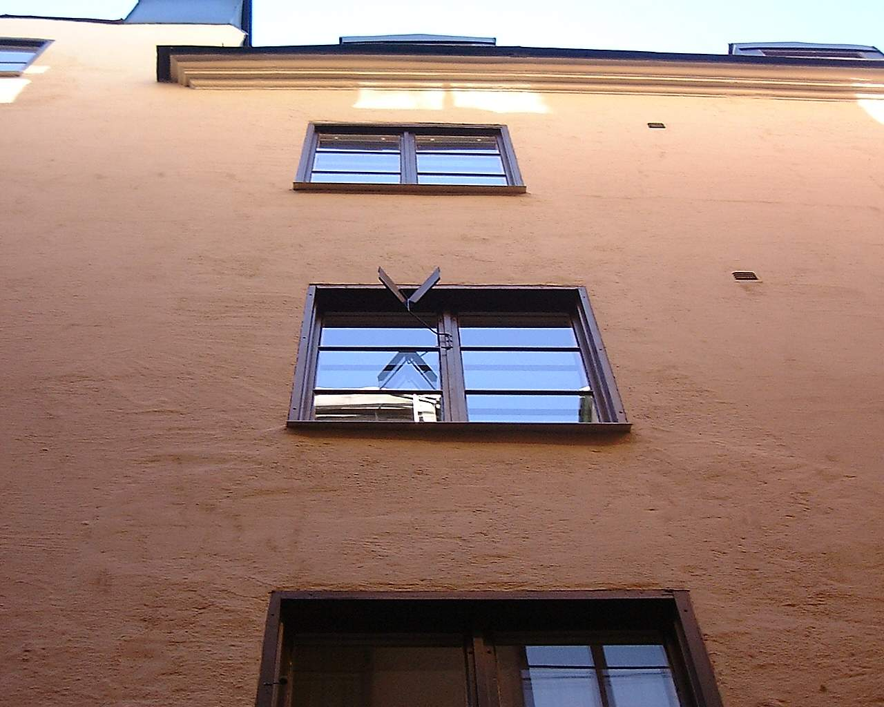 Telegrafgränd (Bootes), Gamla stan, Stockholm.